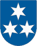 Blazon of Ernetschwil, Canton of St. Gallen - Blazono de Ernetschwil, Kantono de Sankt-Galo